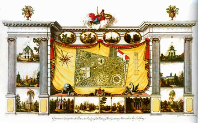 Kolorierte Radierung von Friedrich Müller